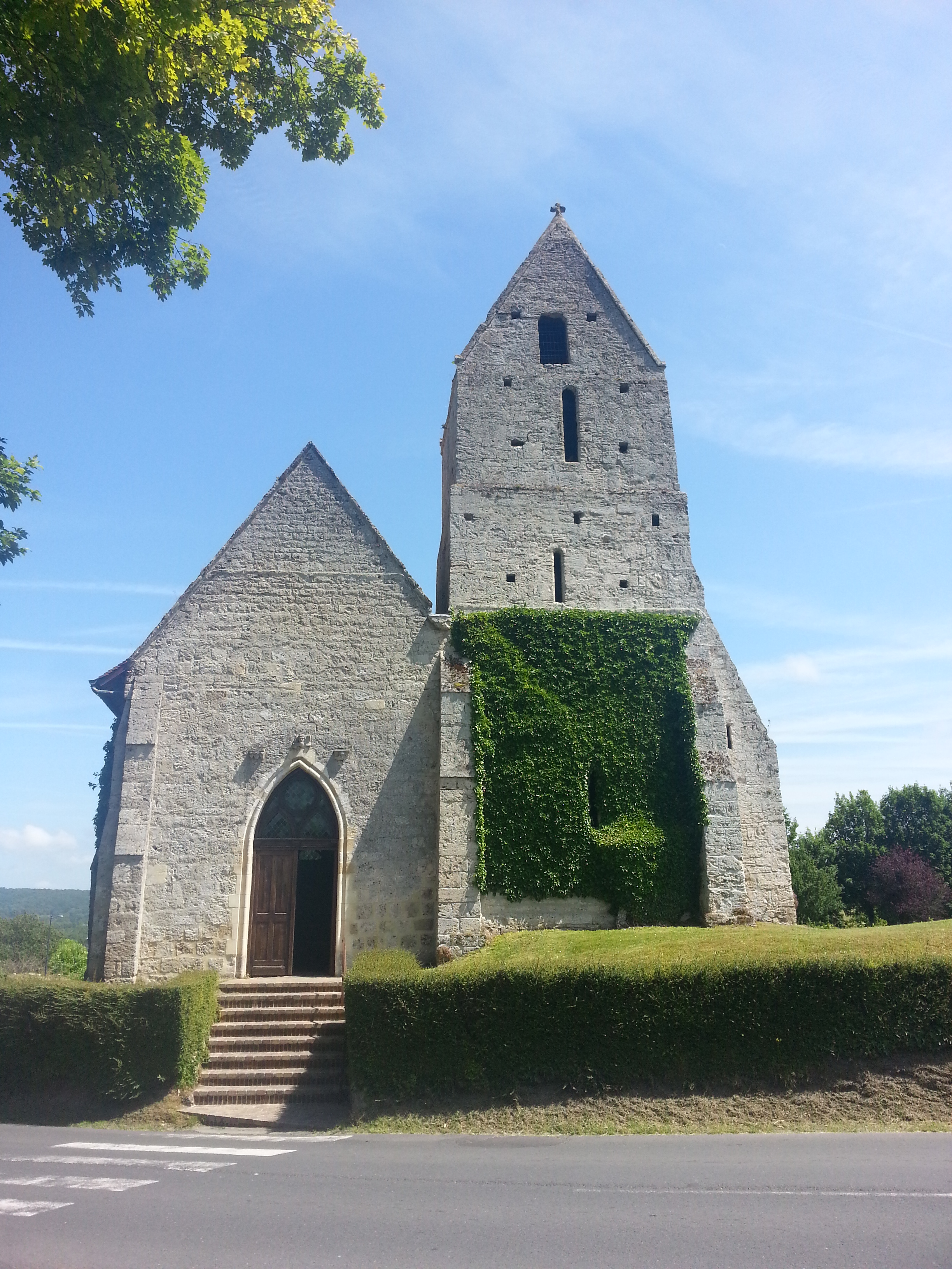 Église Saint-Martin de Cricqueboeuf